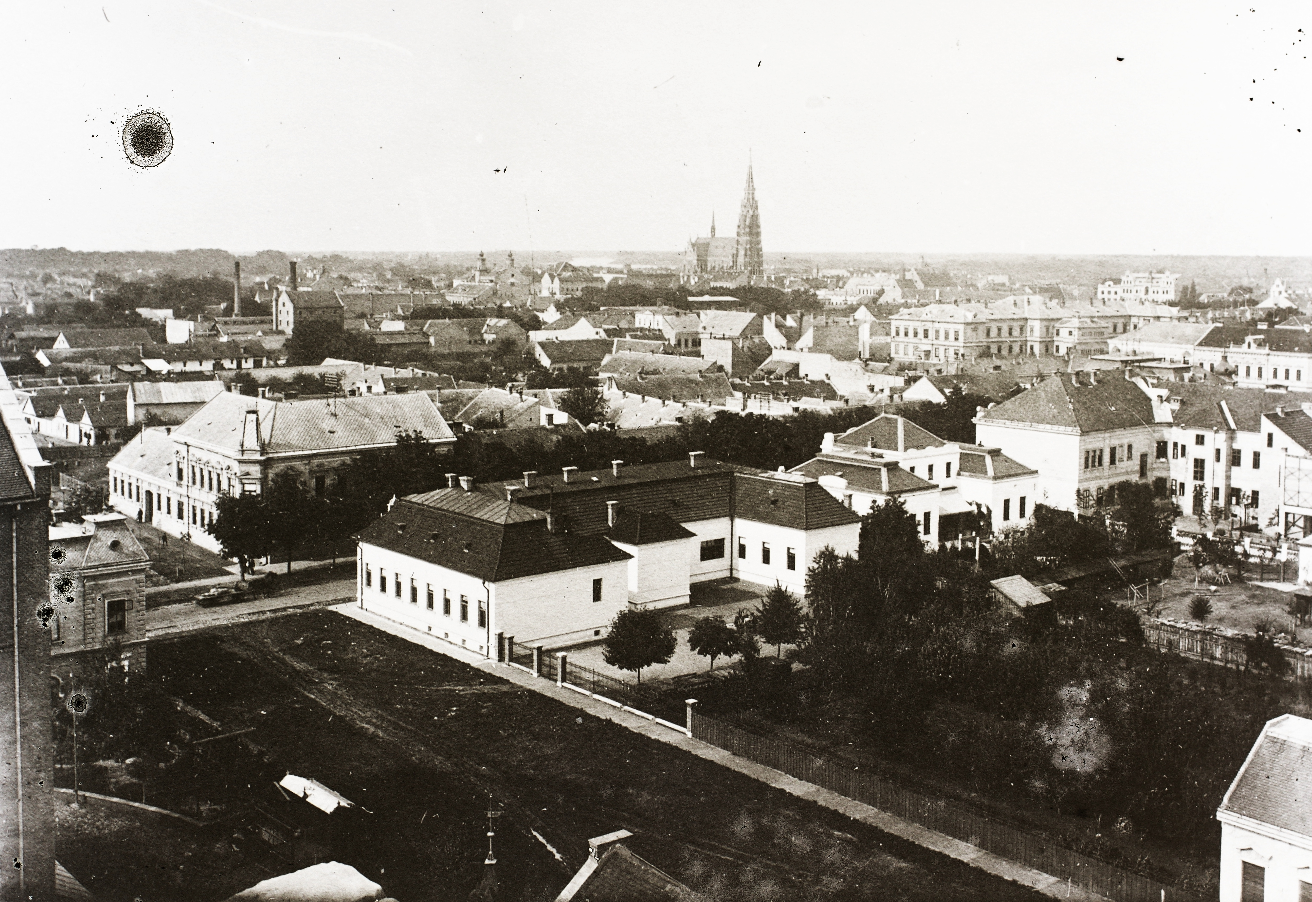 a város látképe, háttérben a Szent Péter és Pál székesegyház. Location: Croatia, Osijek Tags: view, bird's eye view Title: a város látképe, háttérben a Szent Péter és Pál székesegyház.